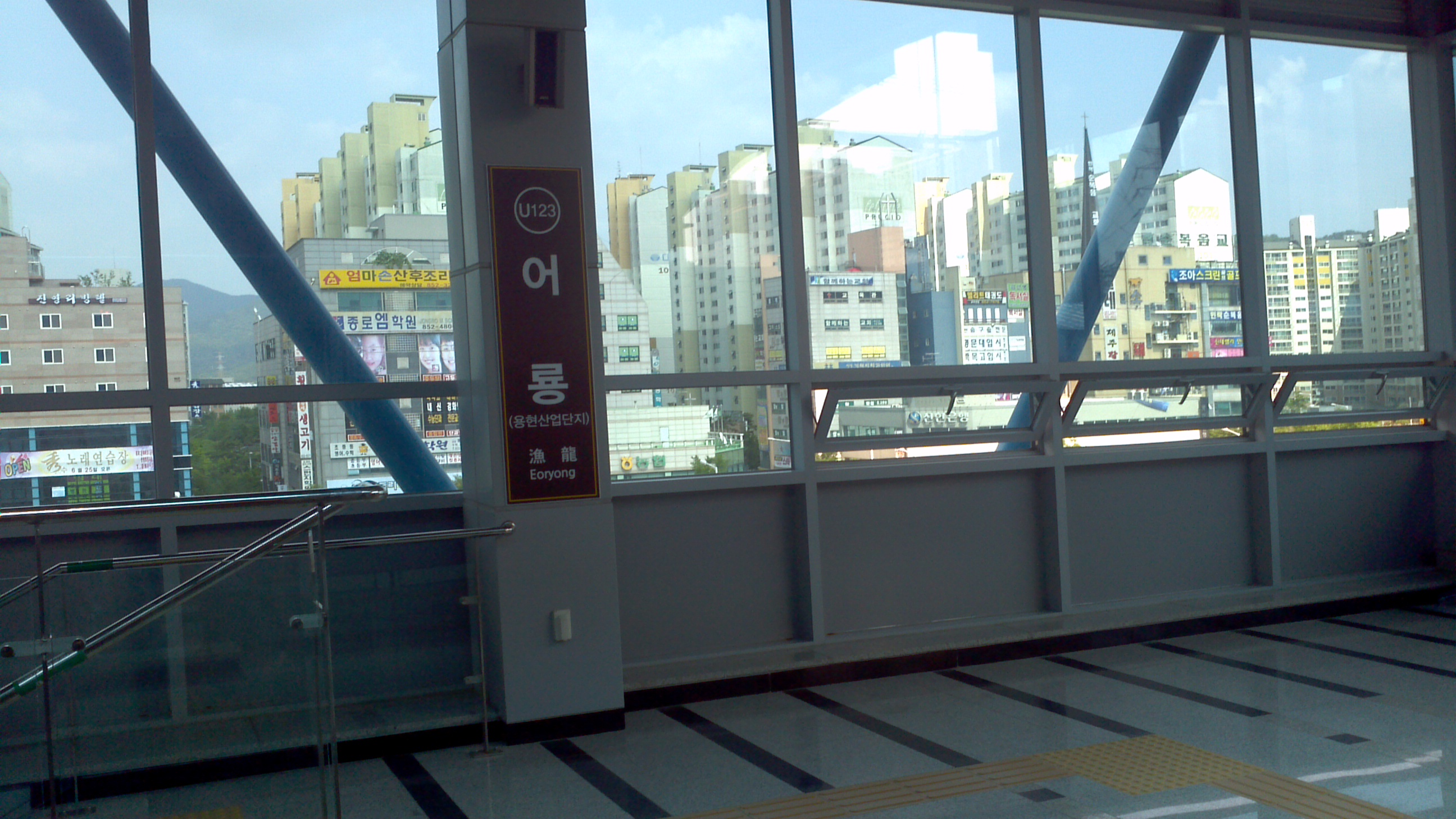 곤제역 역명판